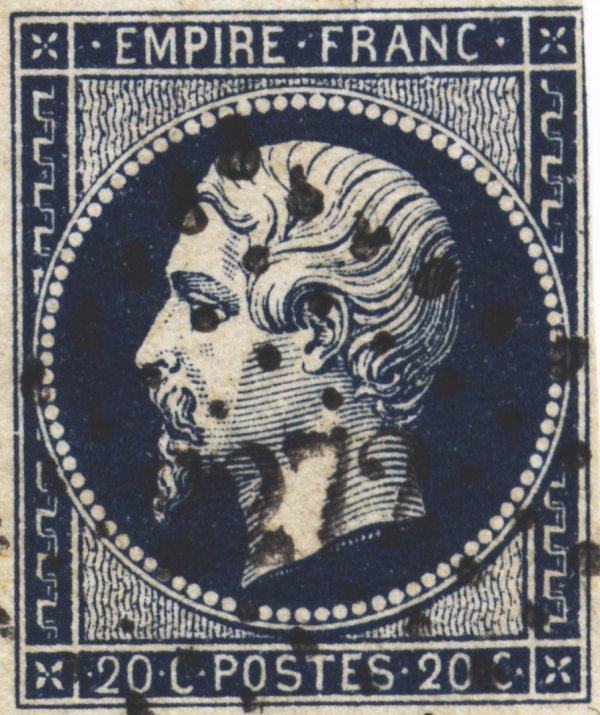 Timbre type Napoléon III, légende Empire franc., bleu (au type 1 : long cheveu à gauche de l'oreille)